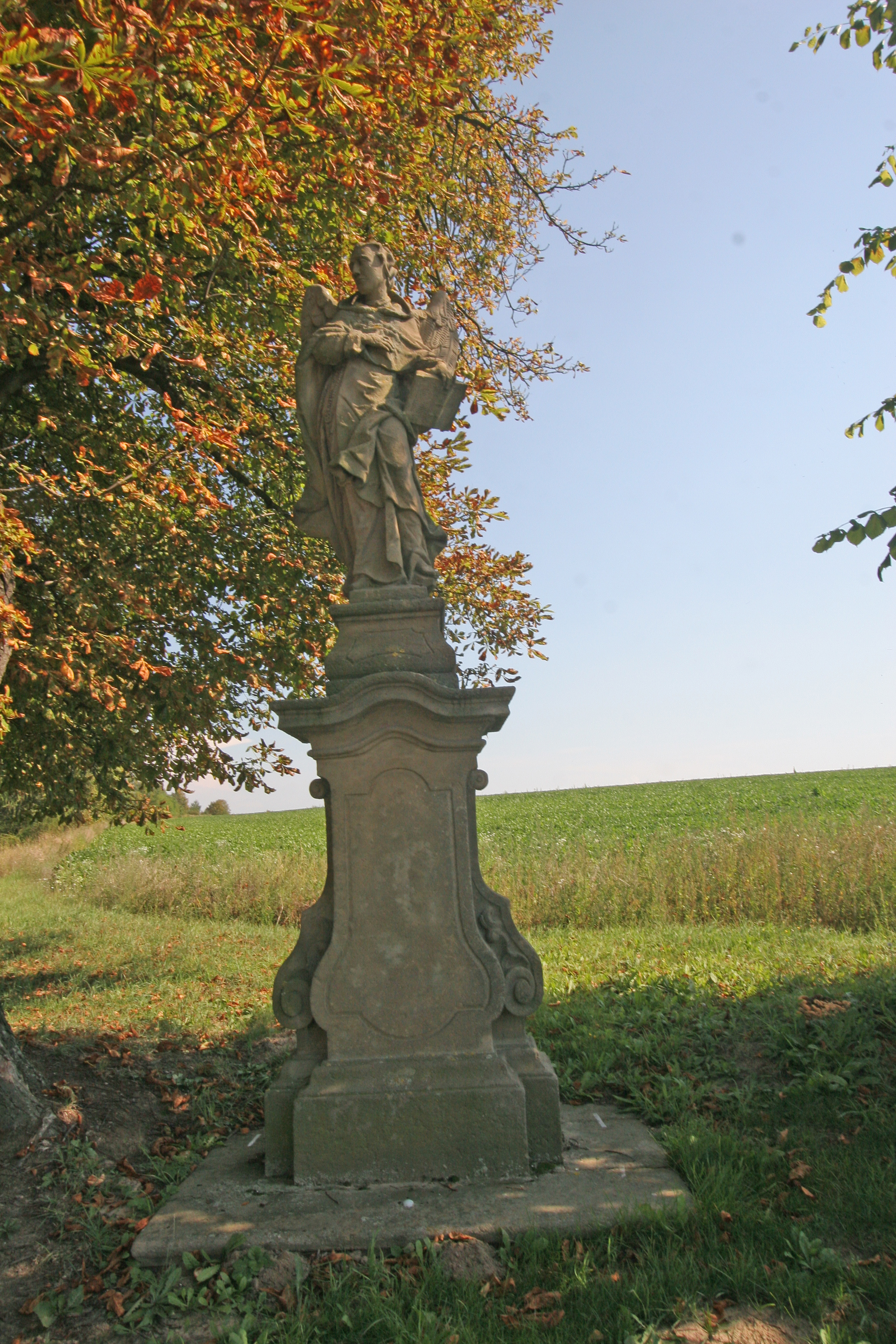 Socha svatého Vincence, na křižovatce směr Miskolezy a Jaroměř, Chvalkovice (okres Náchod).